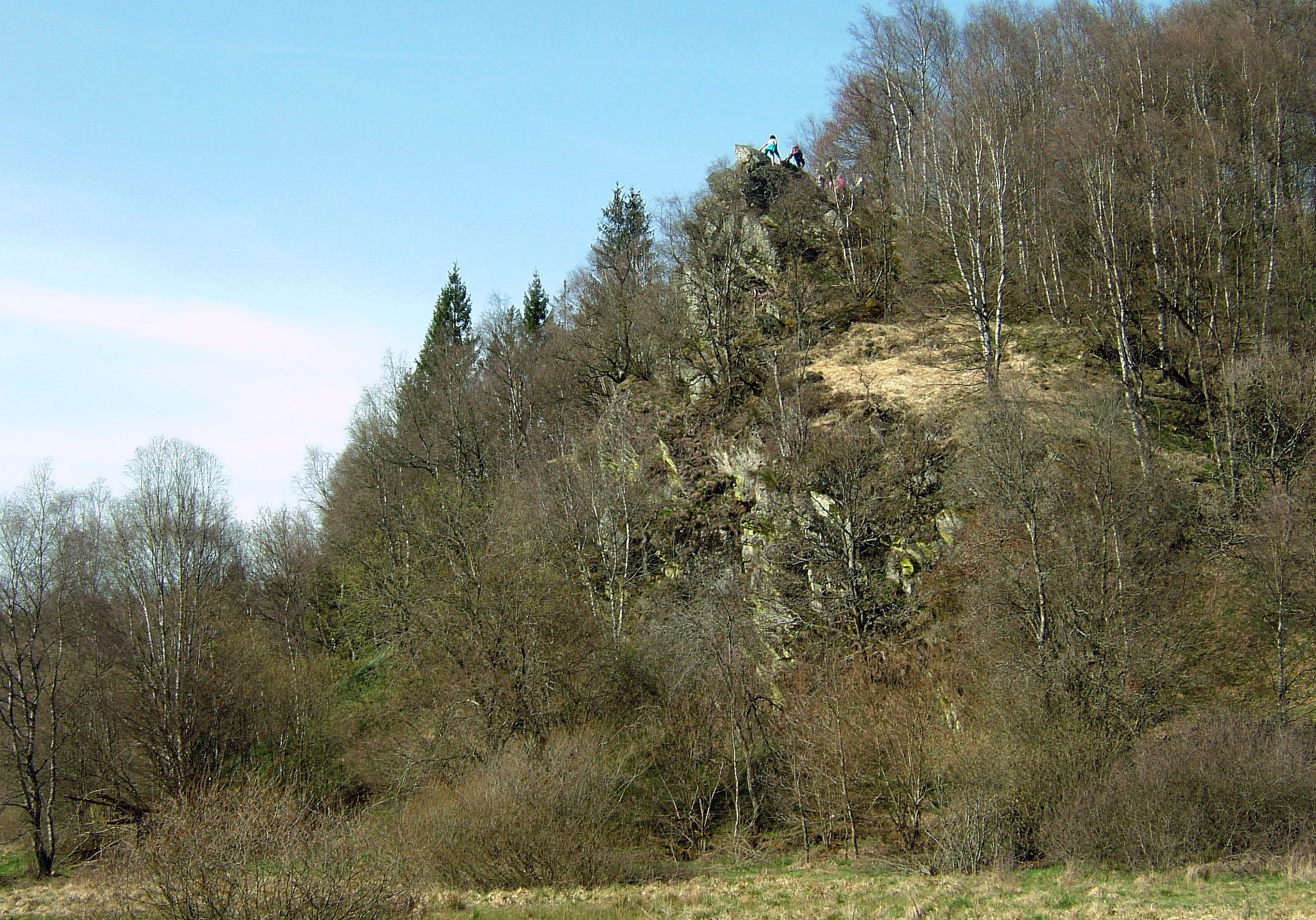 Oberes Perlenbachtal – Bieleifelsen